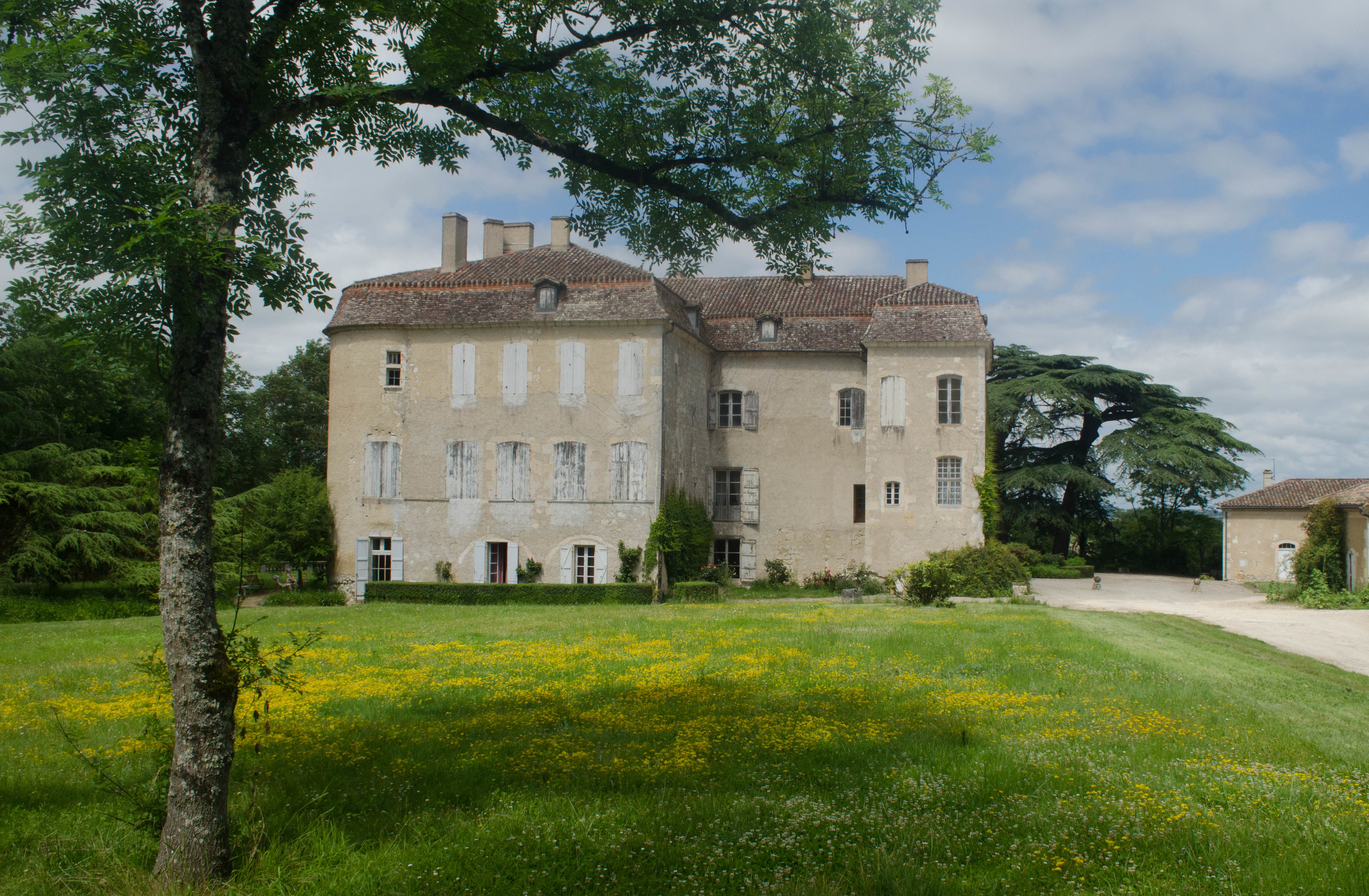 Château de Lacassagne, Saint-Avit-Frandat, Gers, France. Façade Sud